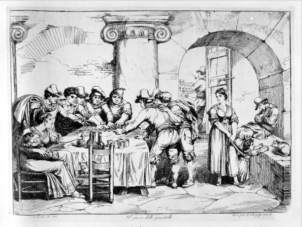 Il gioco della passatella da Bartolomo Pinelli (1831) - Italia.